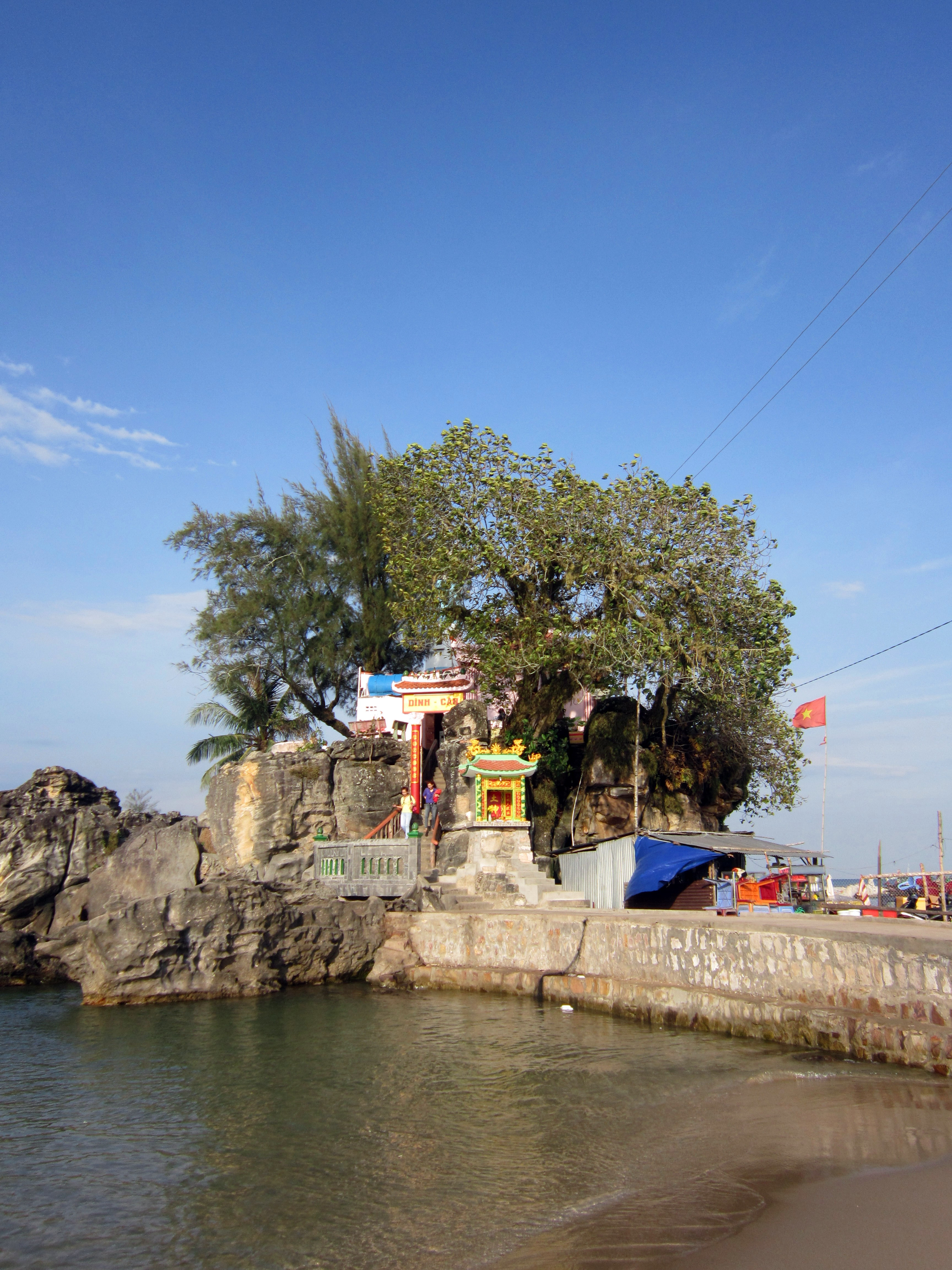 Dinh Cậu còn có tên gọi là Miếu thờ Long Vương, tọa lạc trên một ghềnh đá vươn ra biển, bên cửa sông Dương Đông thuộc thị trấn Dương Đông (Phú Quốc, Kiên Giang, Việt Nam).